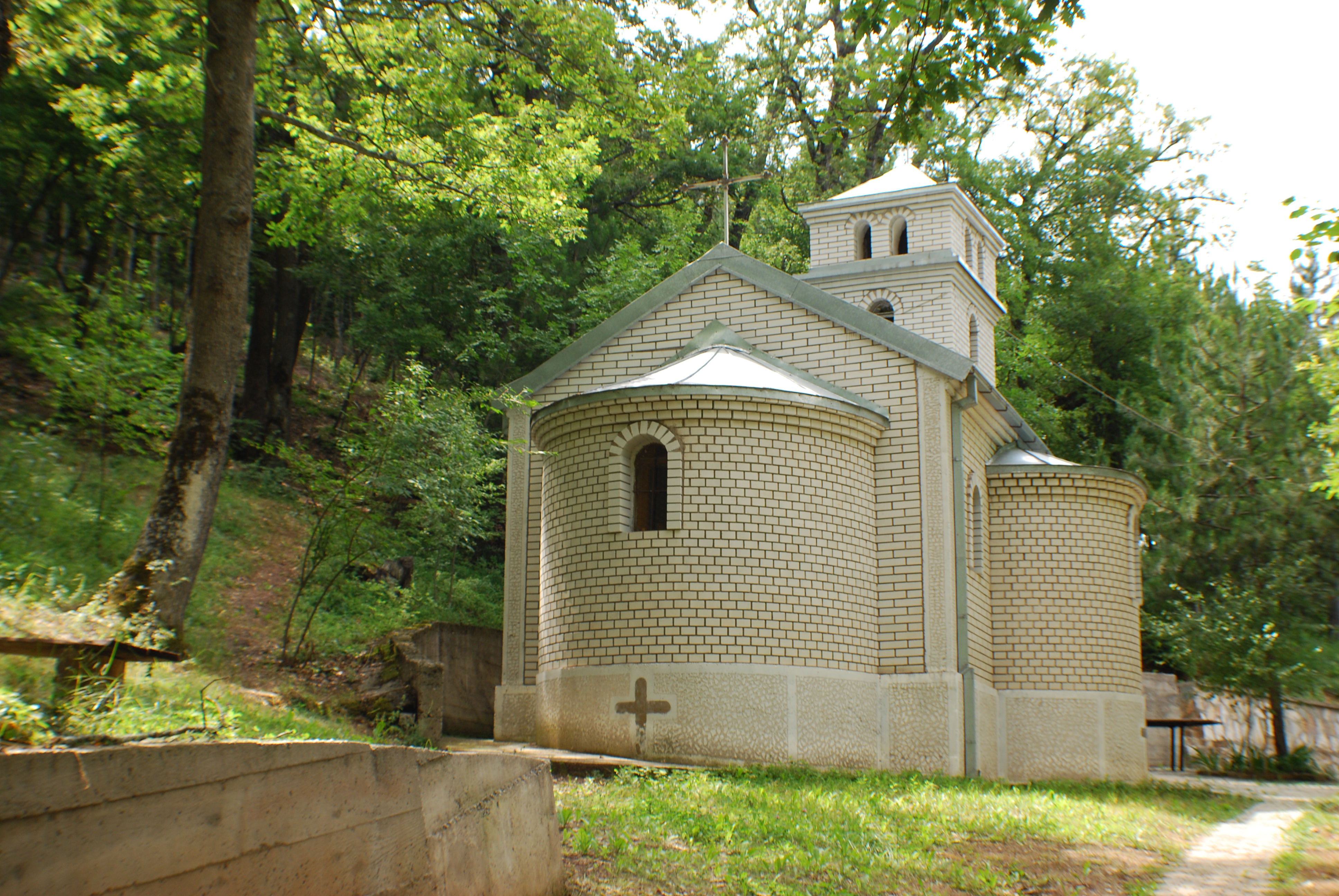 Манастирот Св. Троица во село Блаце, Тетово